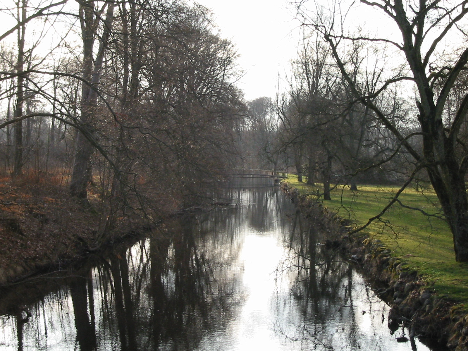 Bråån vid Skarhult. Foto: Richard Johansson